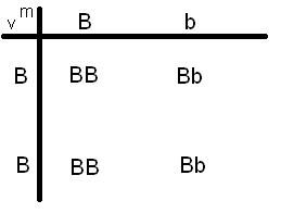 Kruissingsschema Genetica Genetics